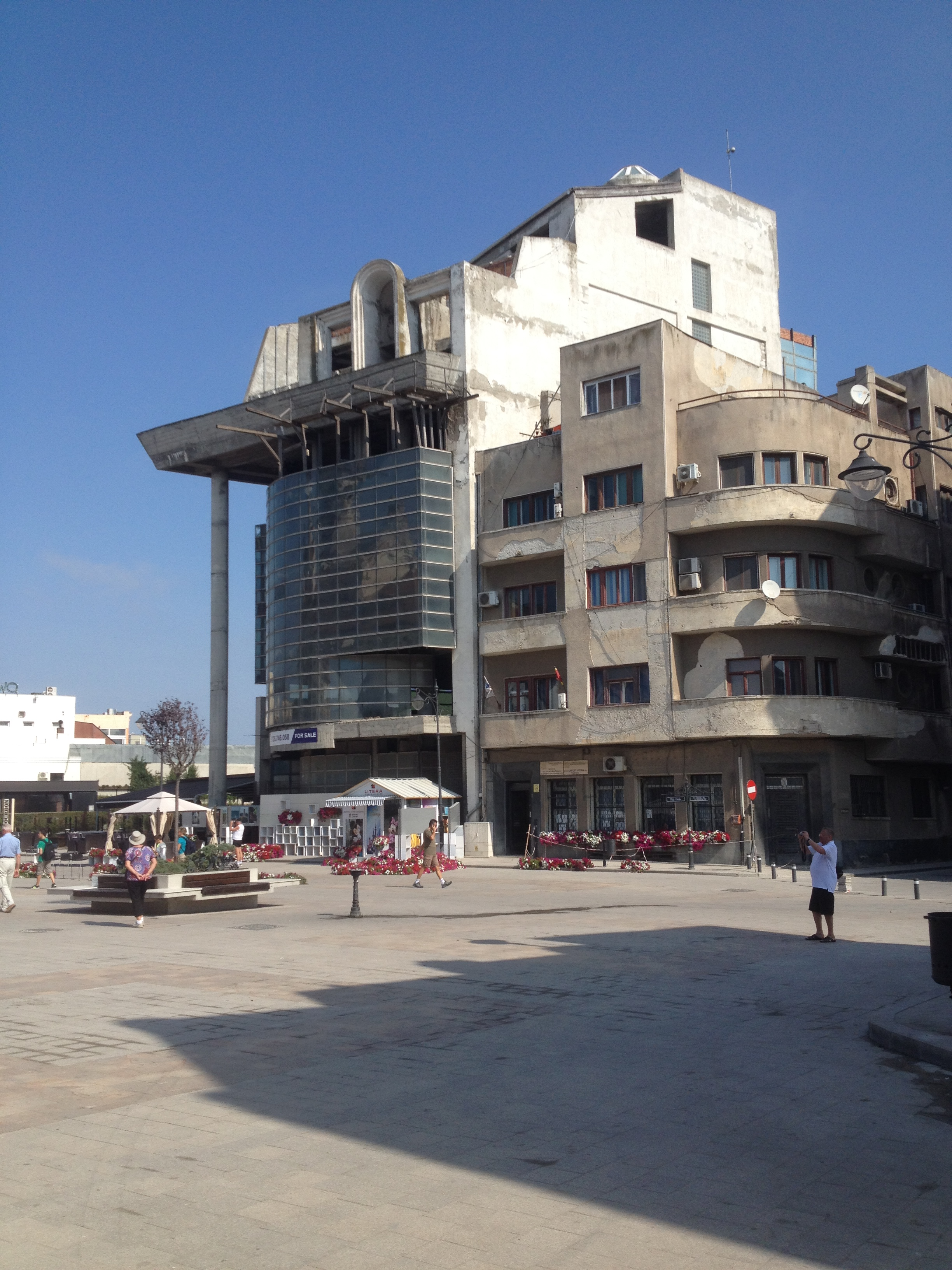 Typisches Straßenbild in der Stadt